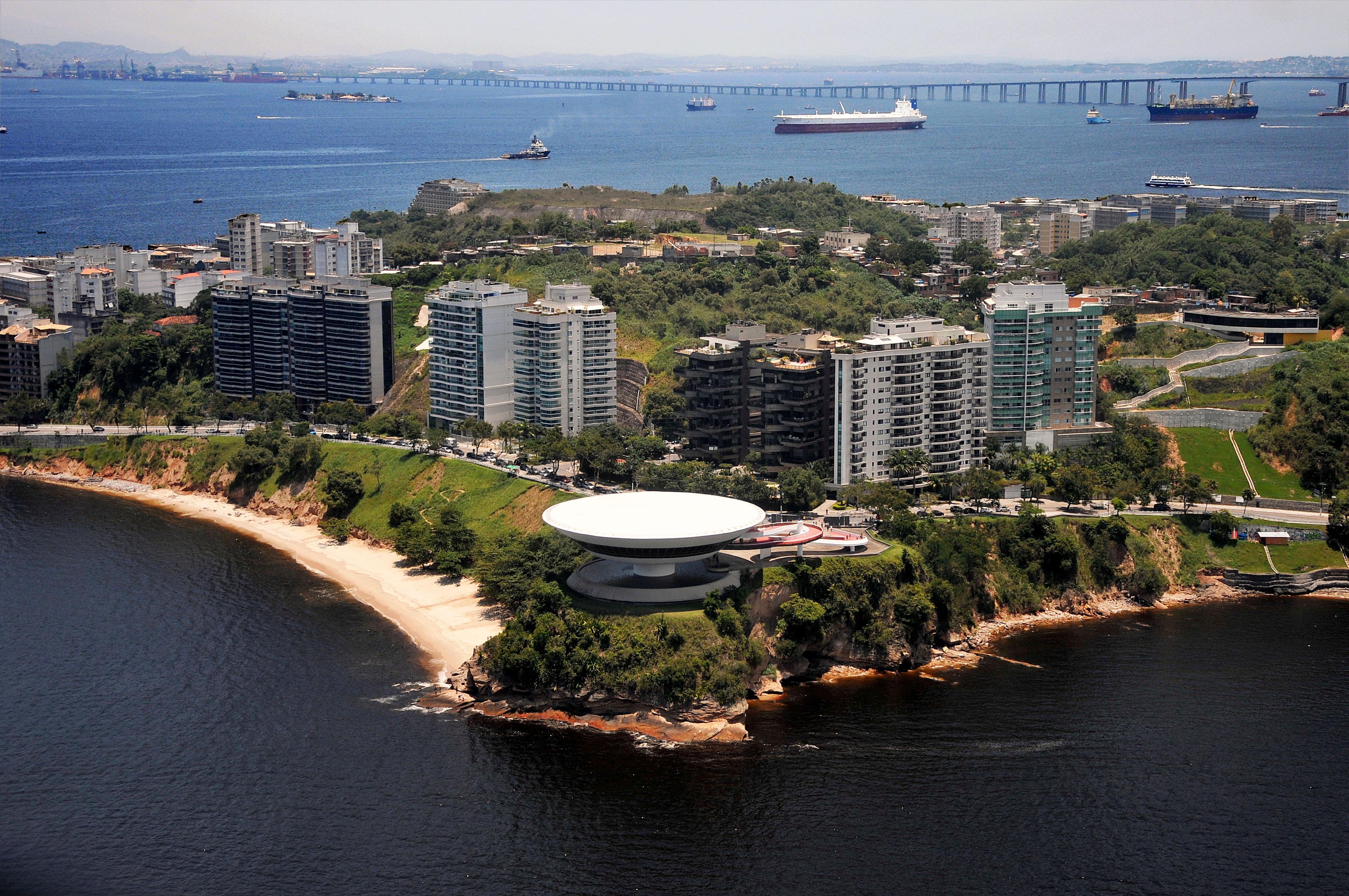 Vista aérea de Niterói.